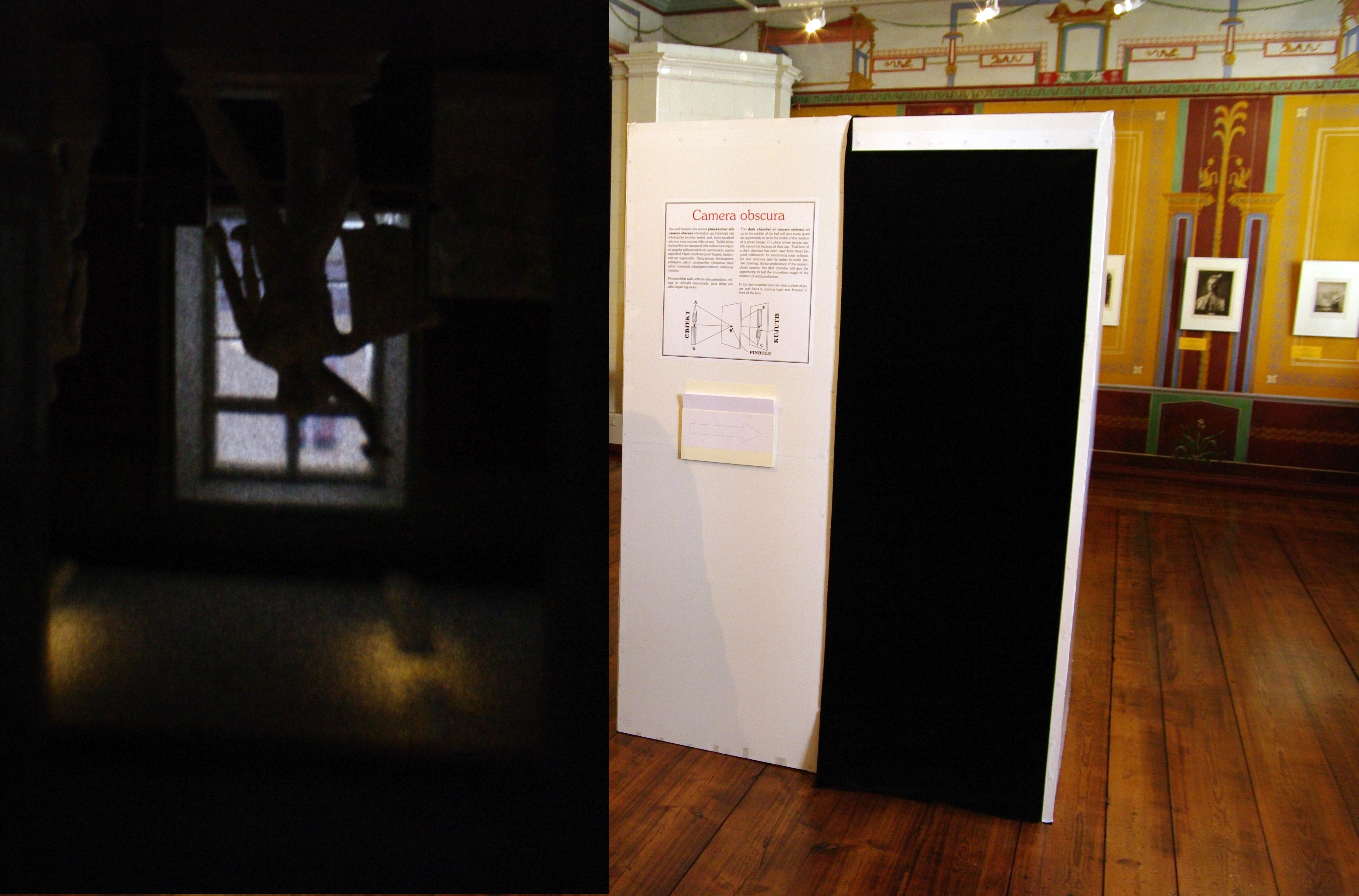 Camera obscura TÜ Kunstimuuseumi näitusel ja kujutis mis seal tekkis